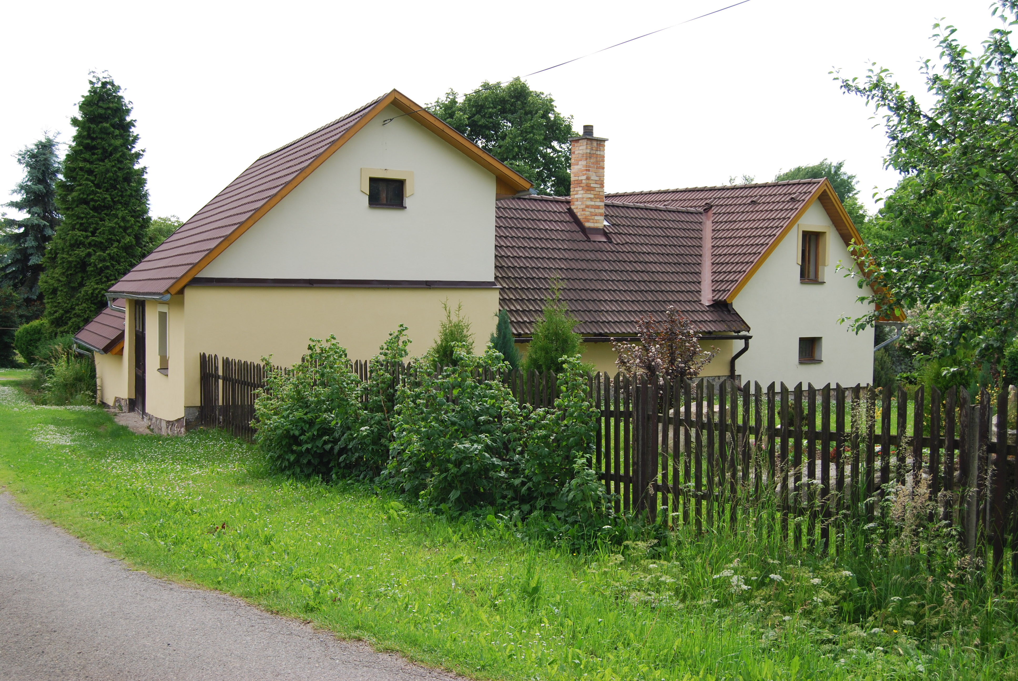 Hrachov je část obce Chyšky v okrese Písek. Česká republika.